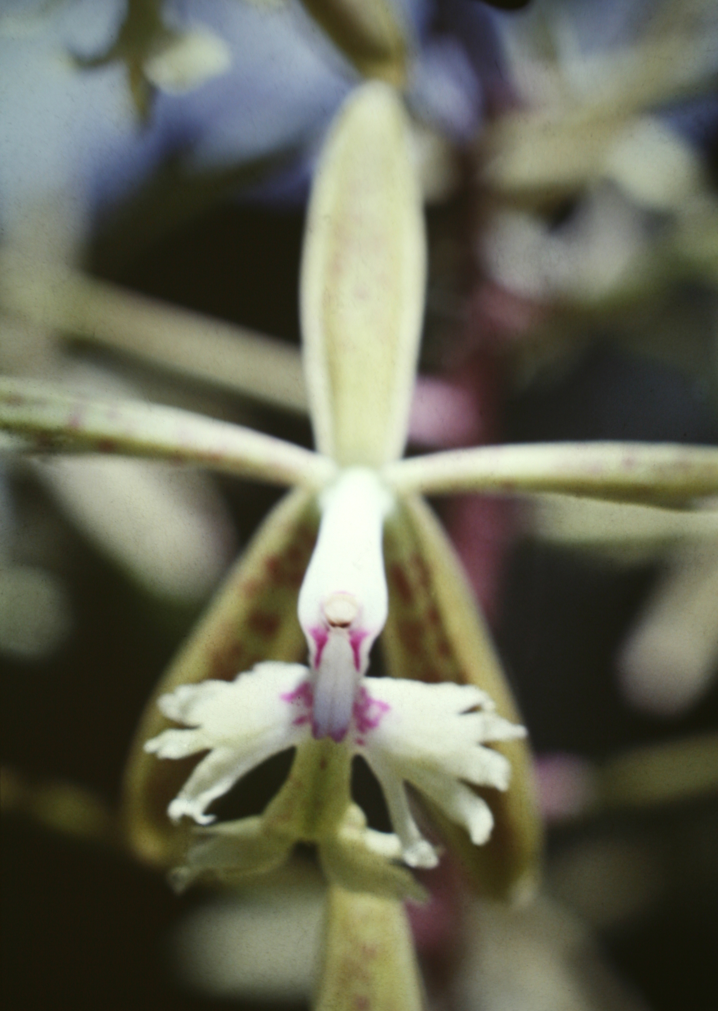 Epidendrum cristatum , Suriname.